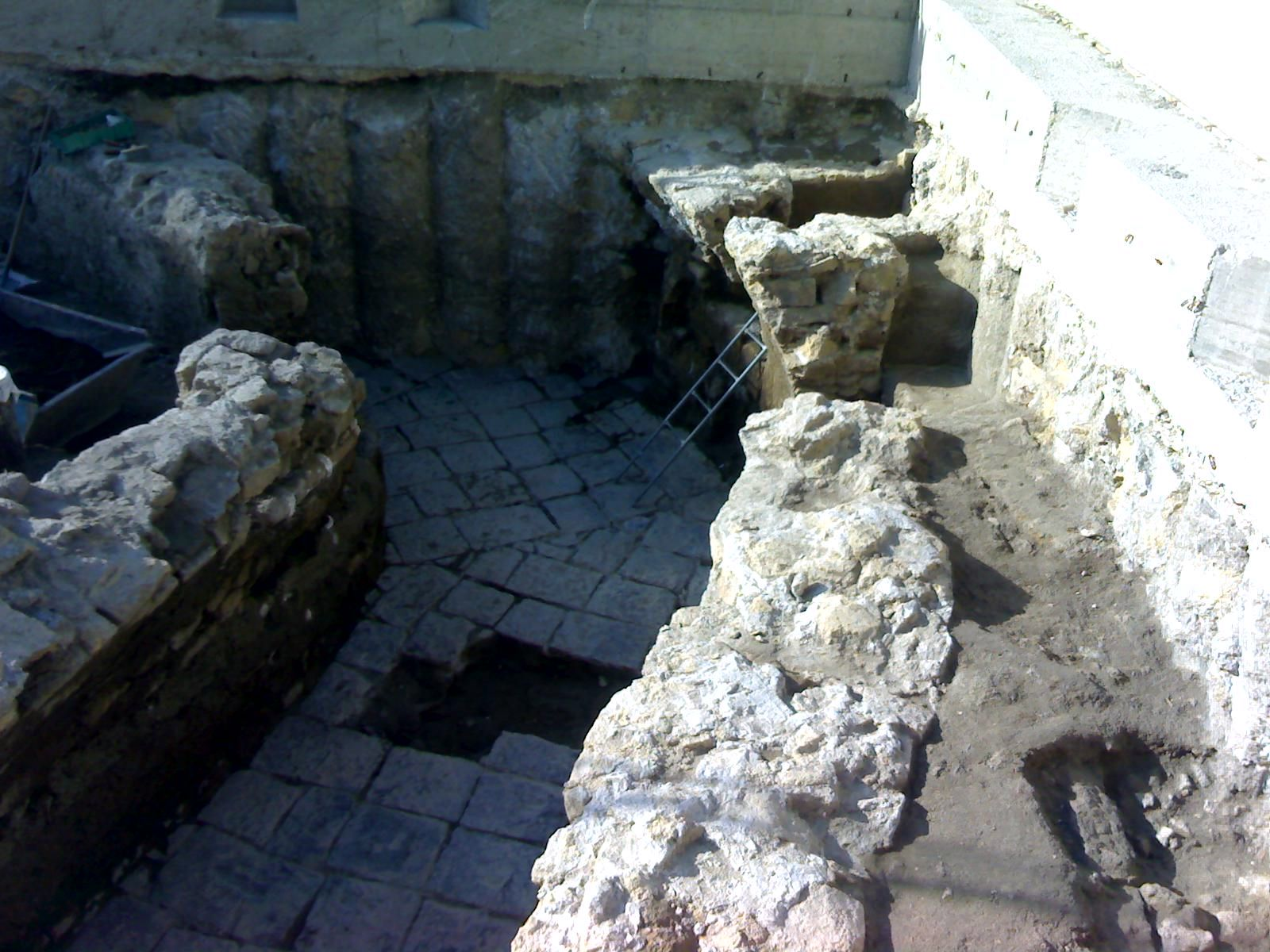 Scavi di via Medina (Piazza Municipio, Napoli)